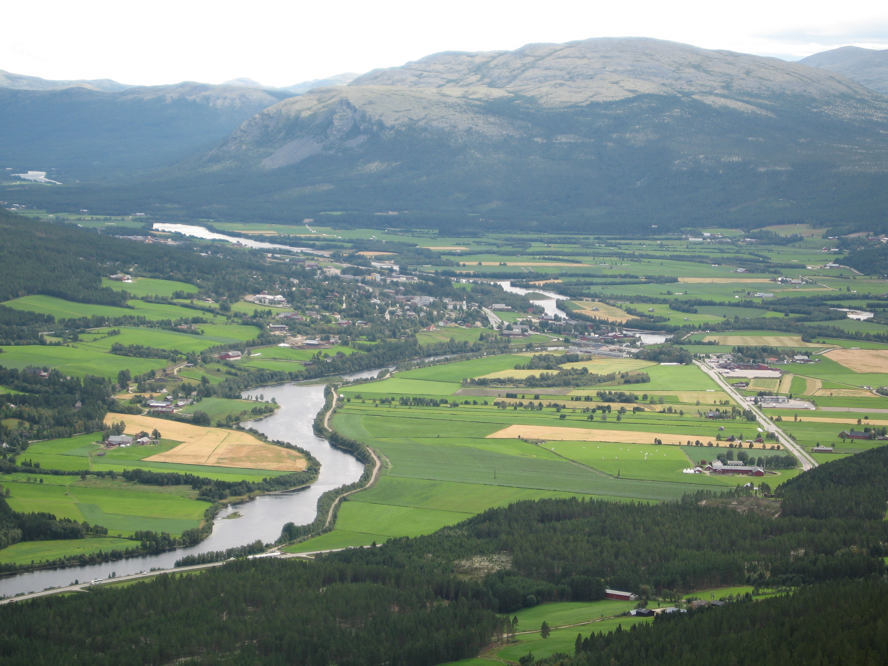 Alvdal